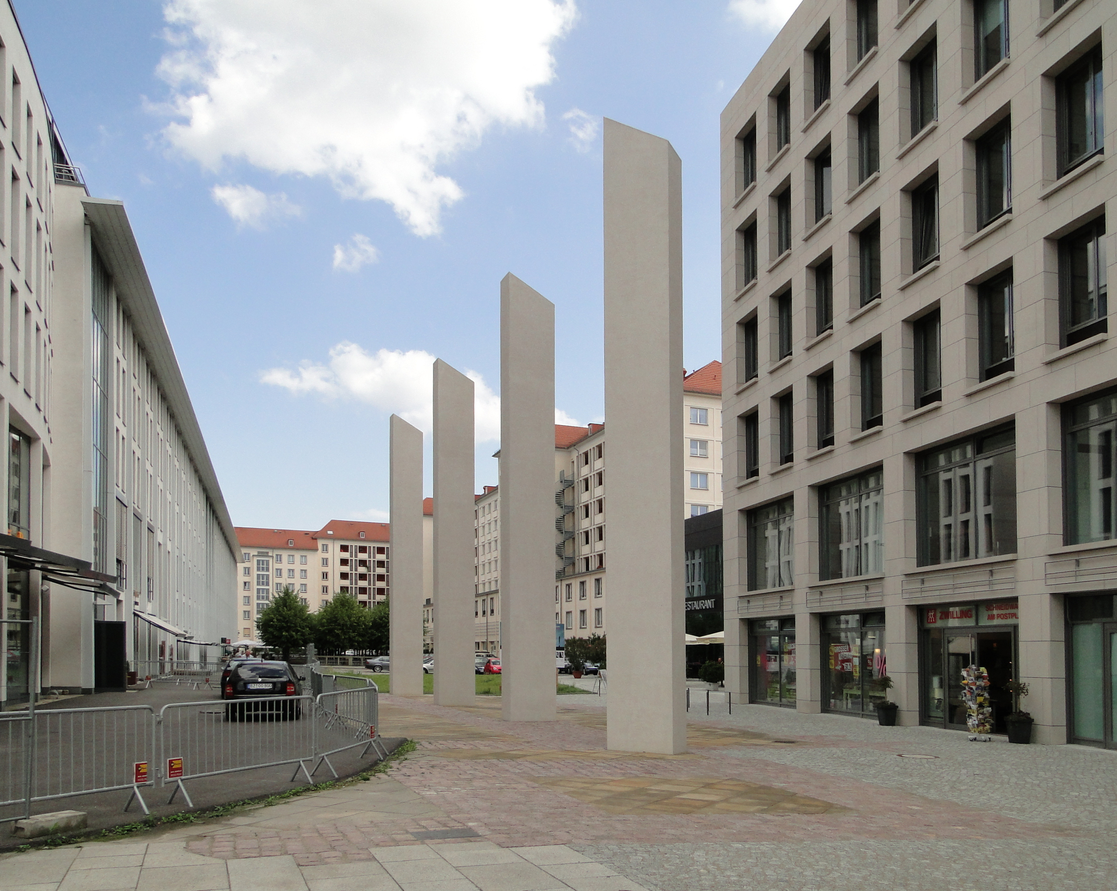 Gedenkstätte Sophienkirche in Dresden, unbeschnitten